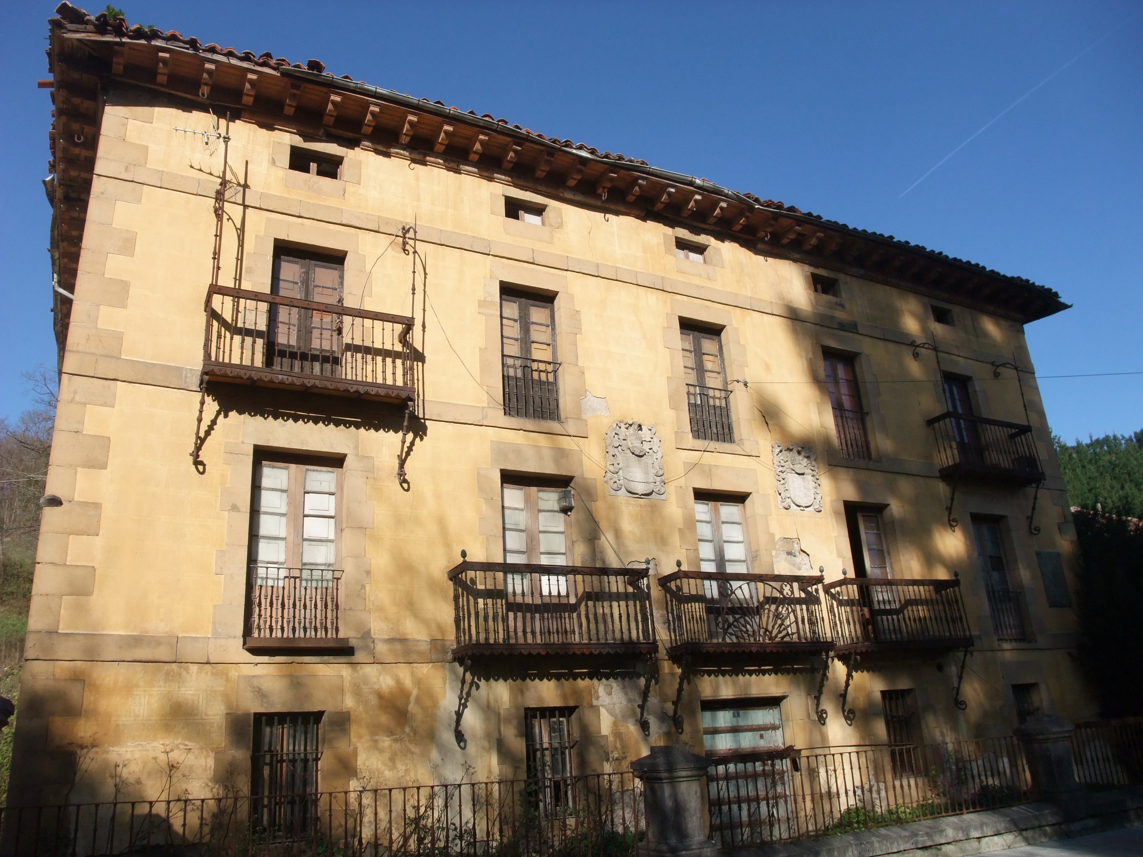 Güeñes (Vizcaya)-Palacio Sarachaga de Cuadra Salcedo-1